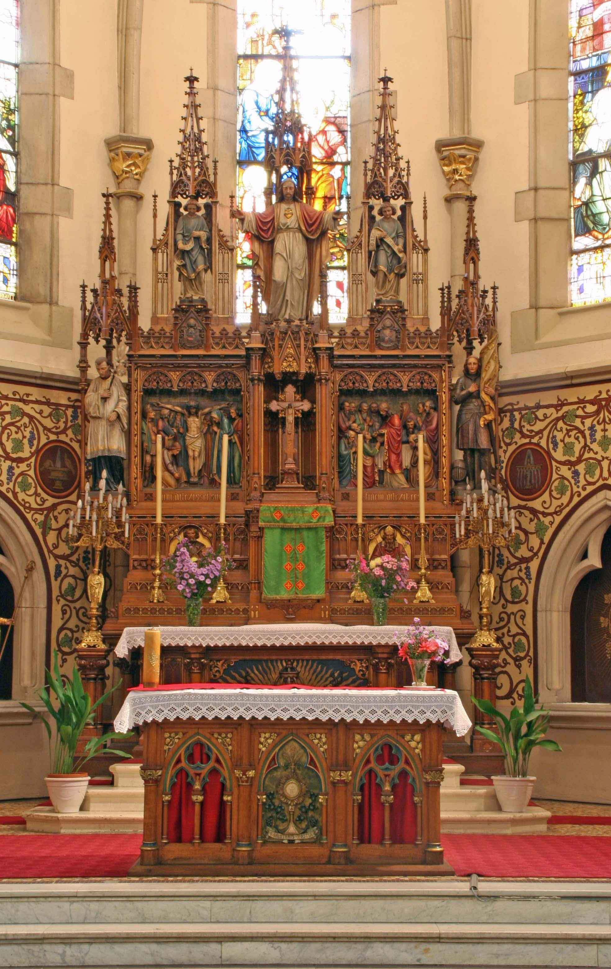 Kierch Réideng (Réideng)